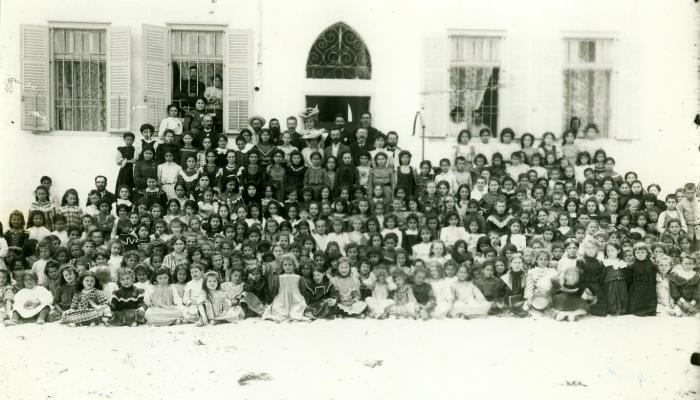 סמינר לוינסקי, בימים בו שכן בלב ליבה של שכונת נווה צדק, 1938-1912